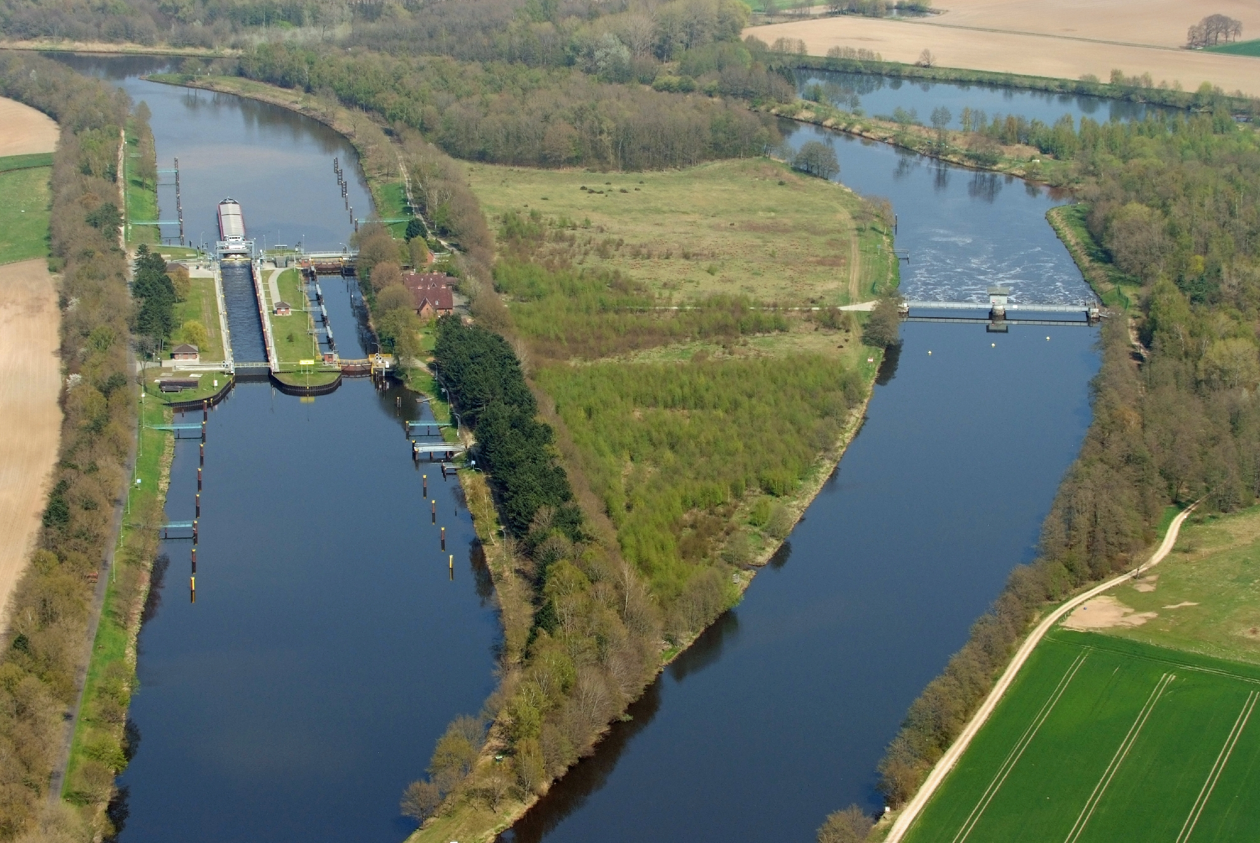 Bollingerfähr bei Kilometer 205,9 des Dortmund-Ems-Kanals bei Heede (Fotoflug von Nordholz-Spieka nach Oldenburg und Papenburg)